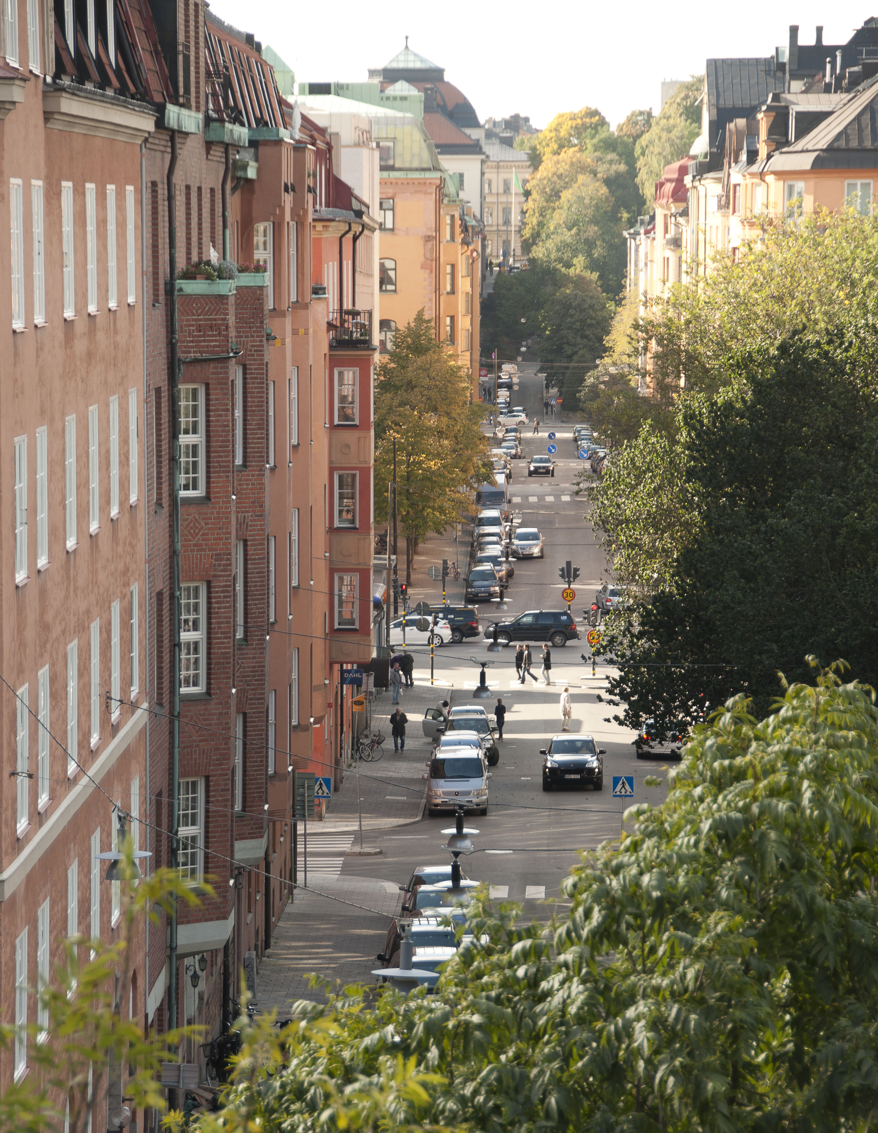 Kungstensgatan västerut. Sedd från Engelbrektskyrkan